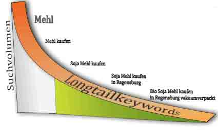 Diese Grafik erläutert, wie sich die Suche bei Suchmaschinen immer genauer definiert. Die Zahlen der Suchanfranfagen wird geringer, je genauer die Suche eingegrenzt wird..